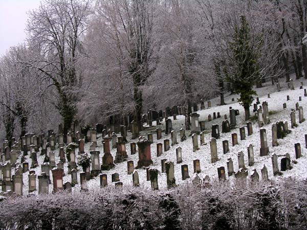 Hebrew Cemetary / Jüdischer Friedhof in Gailingen am Hochrhein